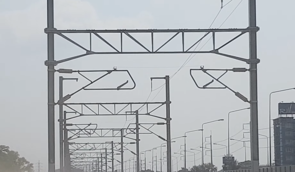 สายส่งเหนือหัว